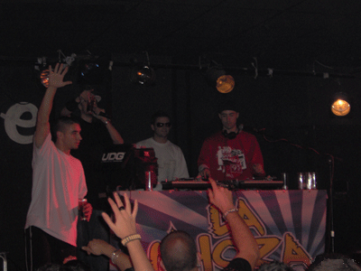 foto del grupo de rap español Zero positivo en concierto.